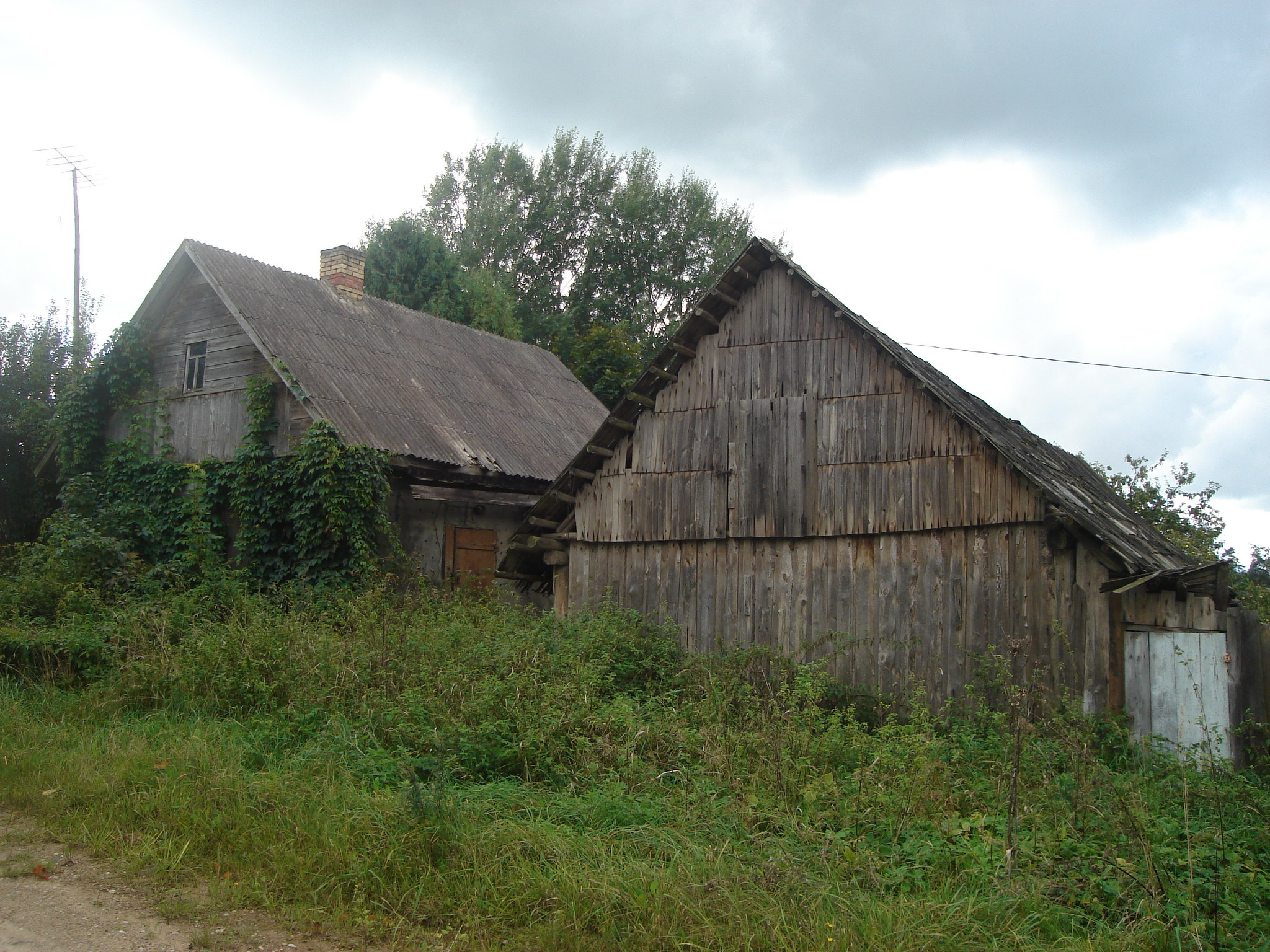 Ambeļi Parish, Latvia